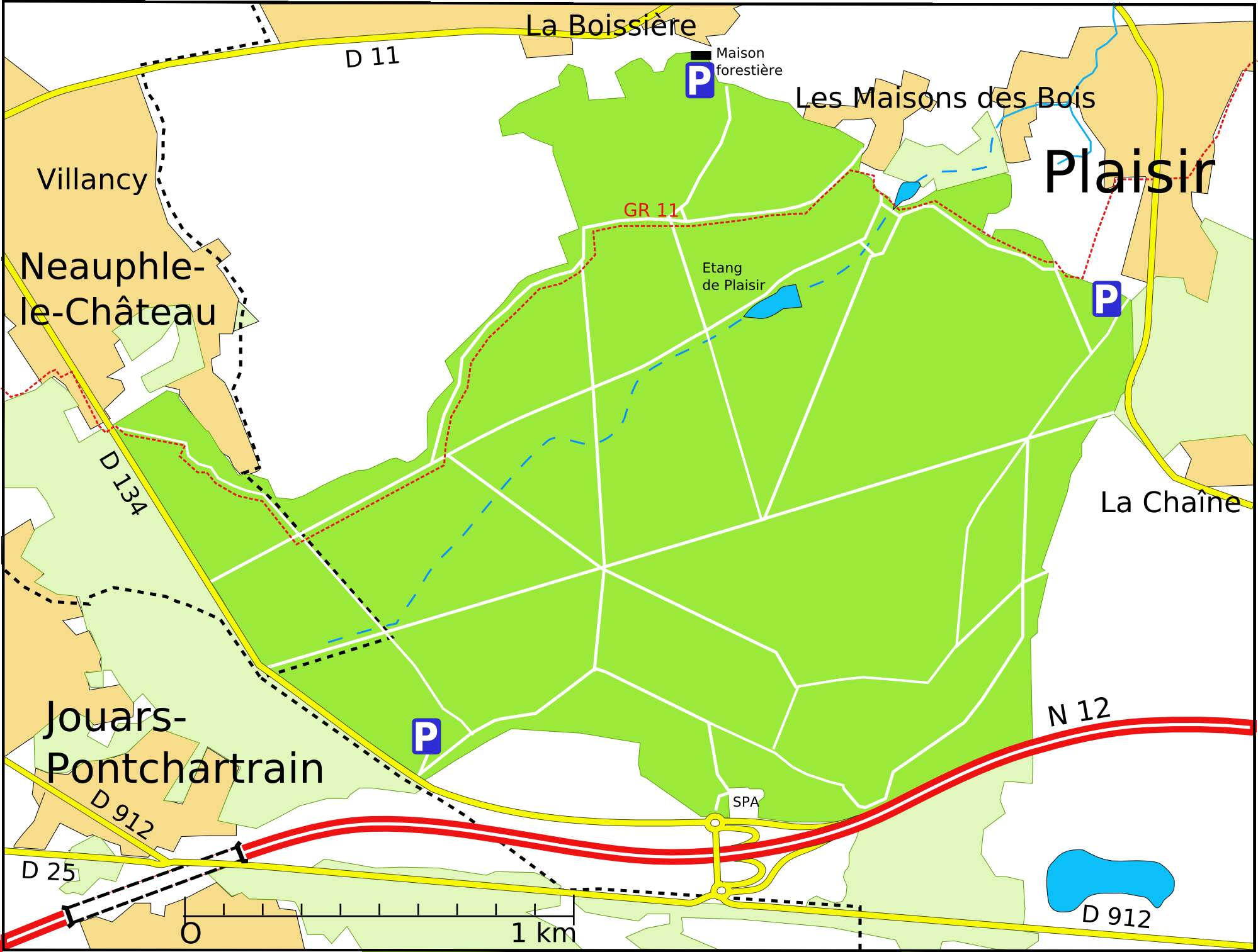 Carte de la forêt de sainte-Apolline à Plaisir - Yvelines (France)